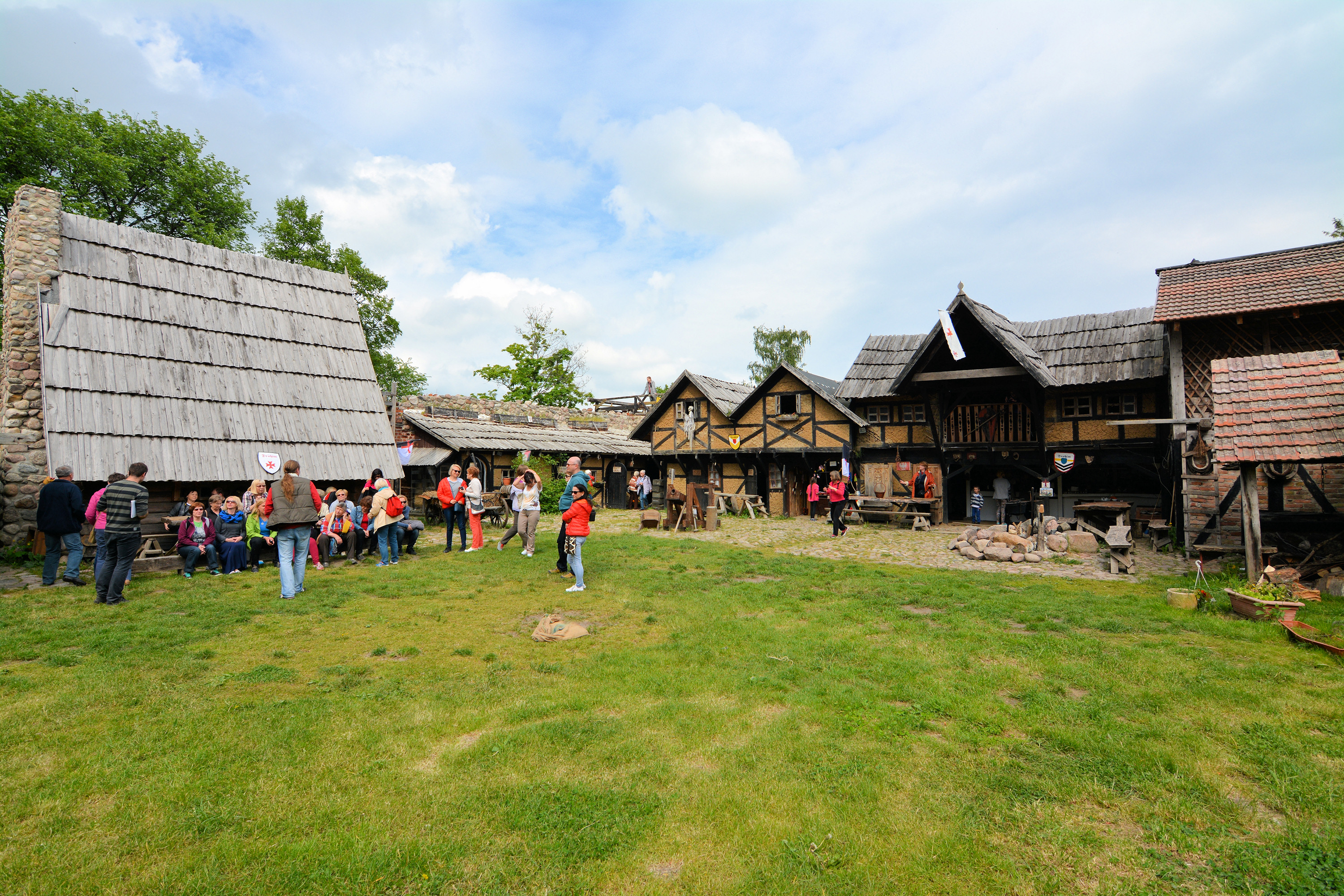 Dziedziniec zamku Drahim w Starym Drawsku